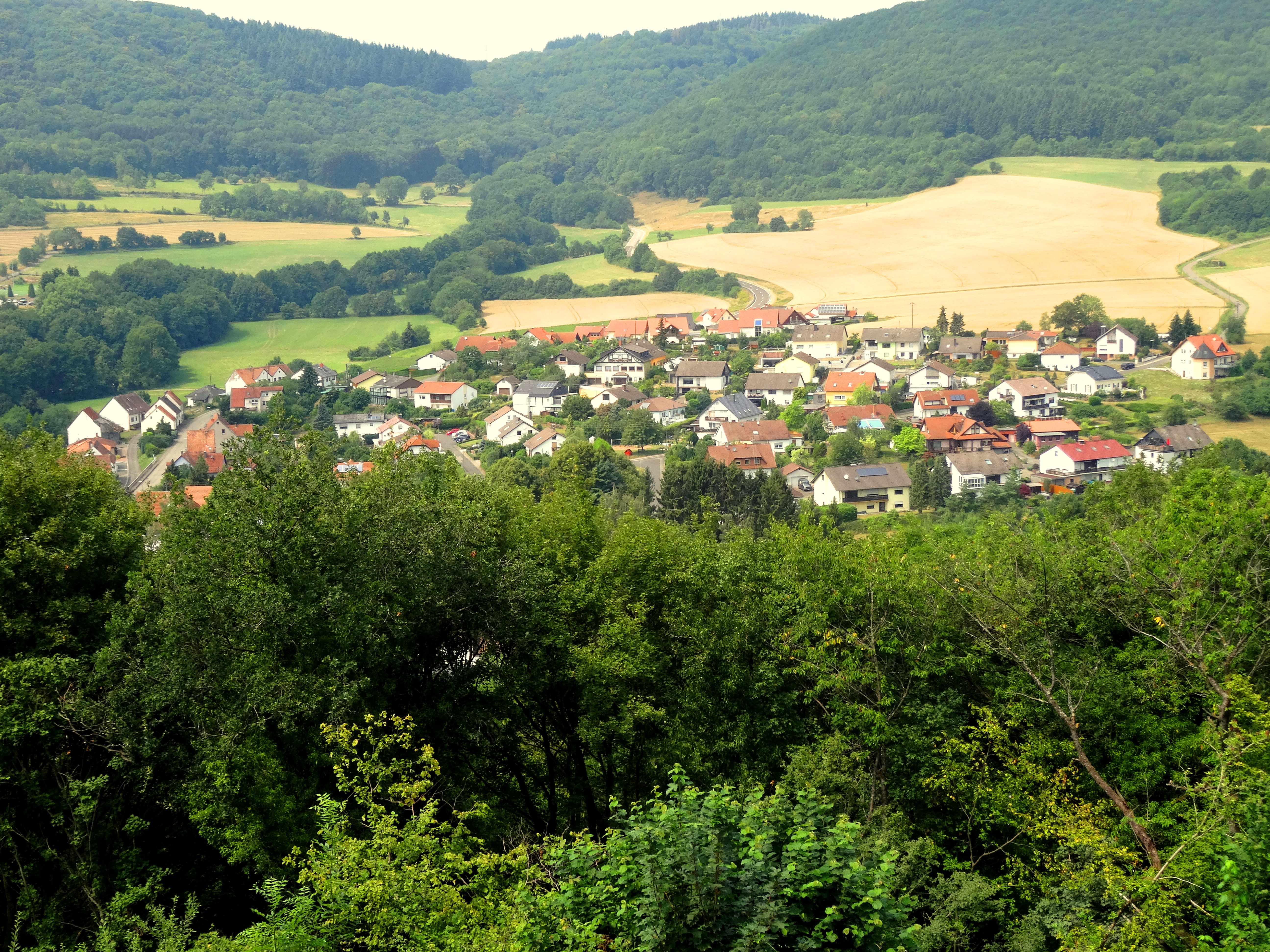 Ortsansicht Thallichtenberg (Foto-Standort: Burg Lichtenberg)